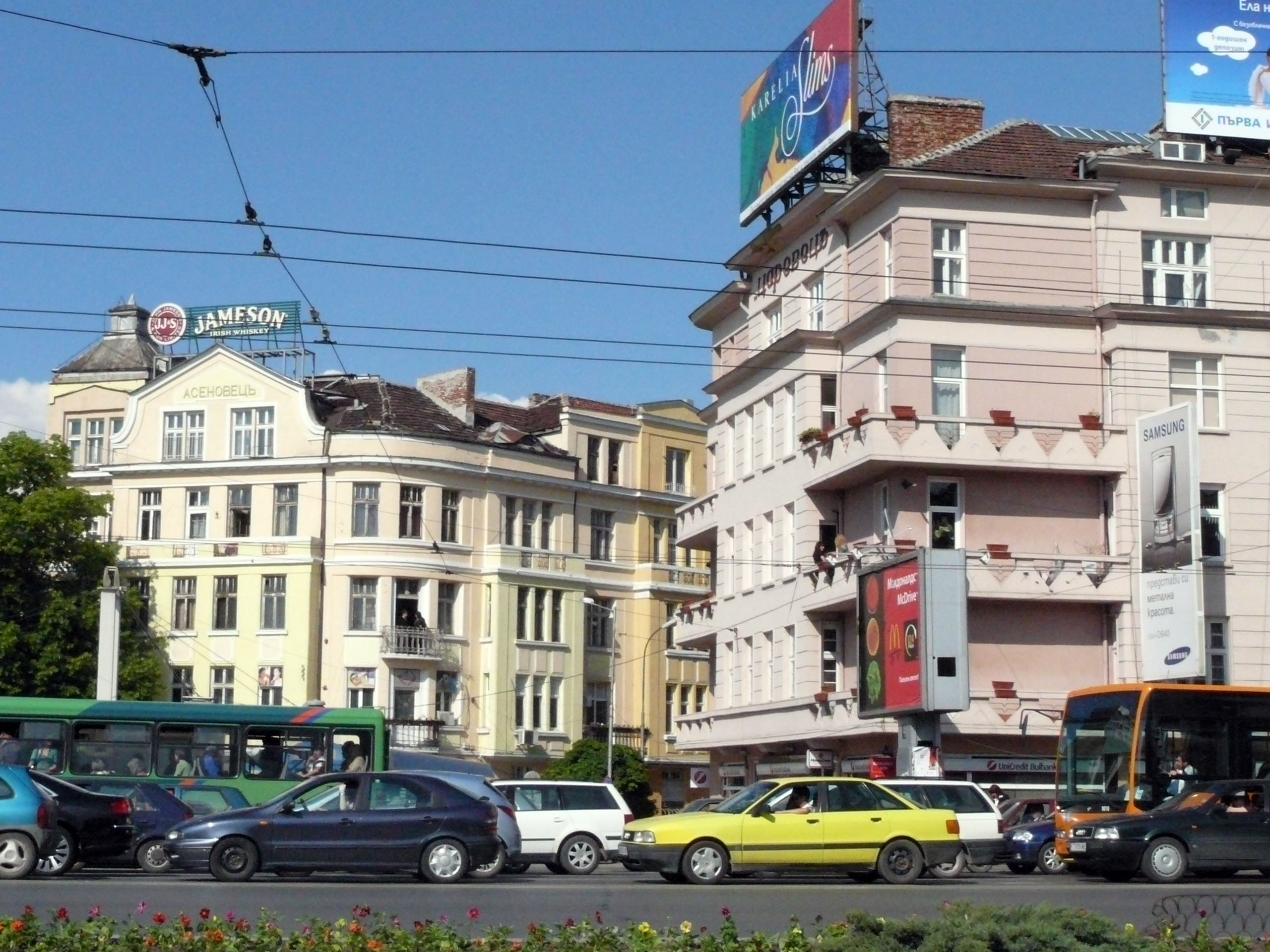 Orlov most,Sofia,Bulgaria